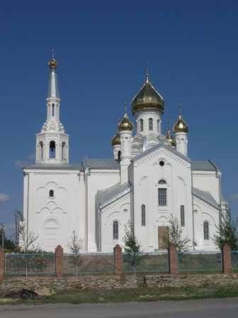 Церковь в Тацинской